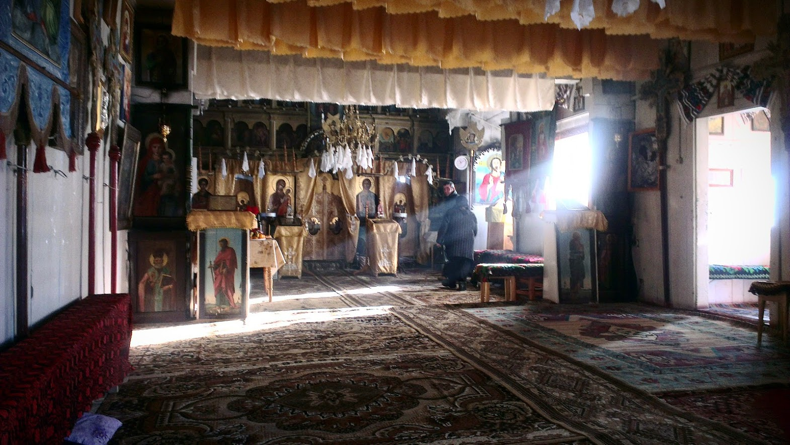 Interiorul bisericii de lemn „Sf. Dumitru” din Călinești Enache, Suceava